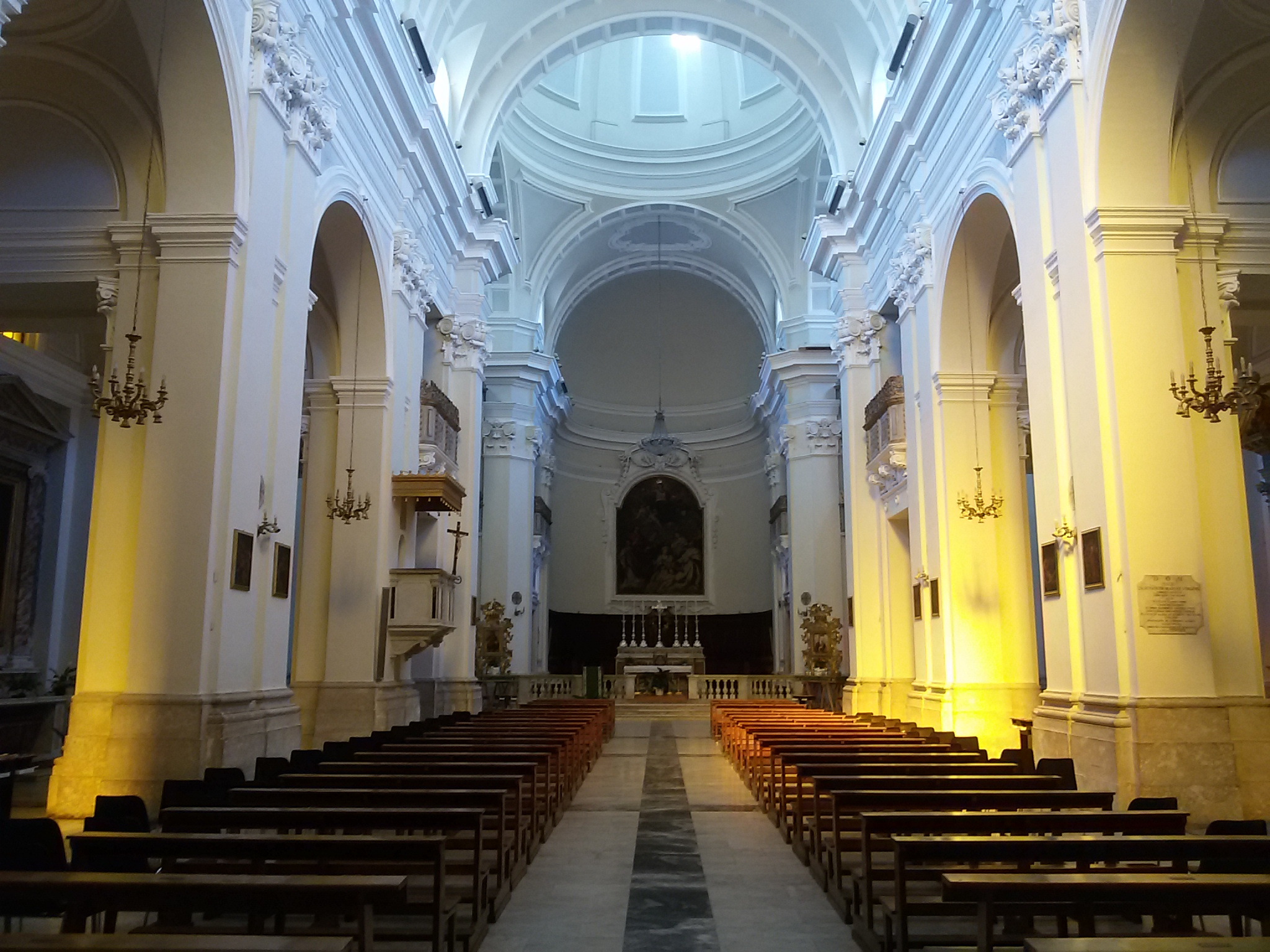 Basilica di Santa Maria Assunta, Orte (VT)